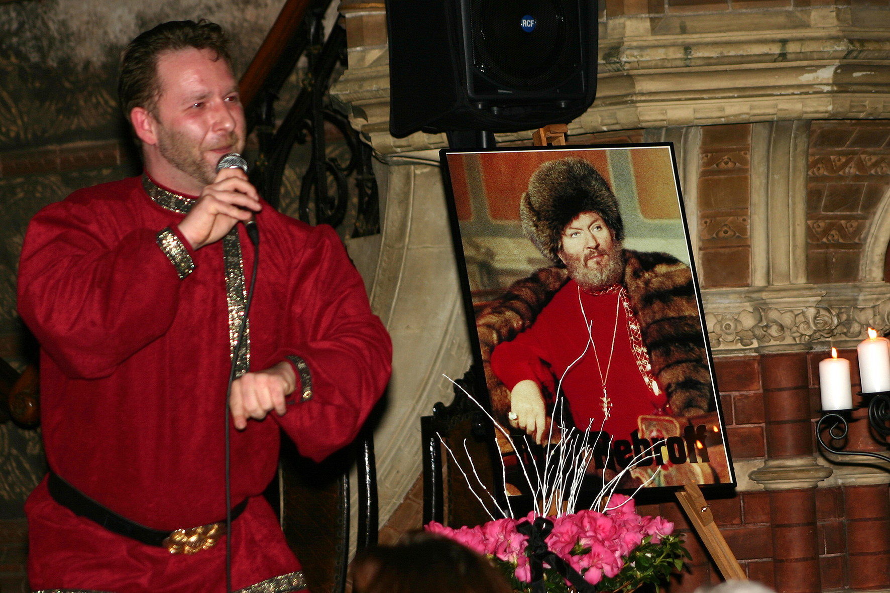 Ronny Weiland bei einem Gedenkkonkert für Ivan Rebroff